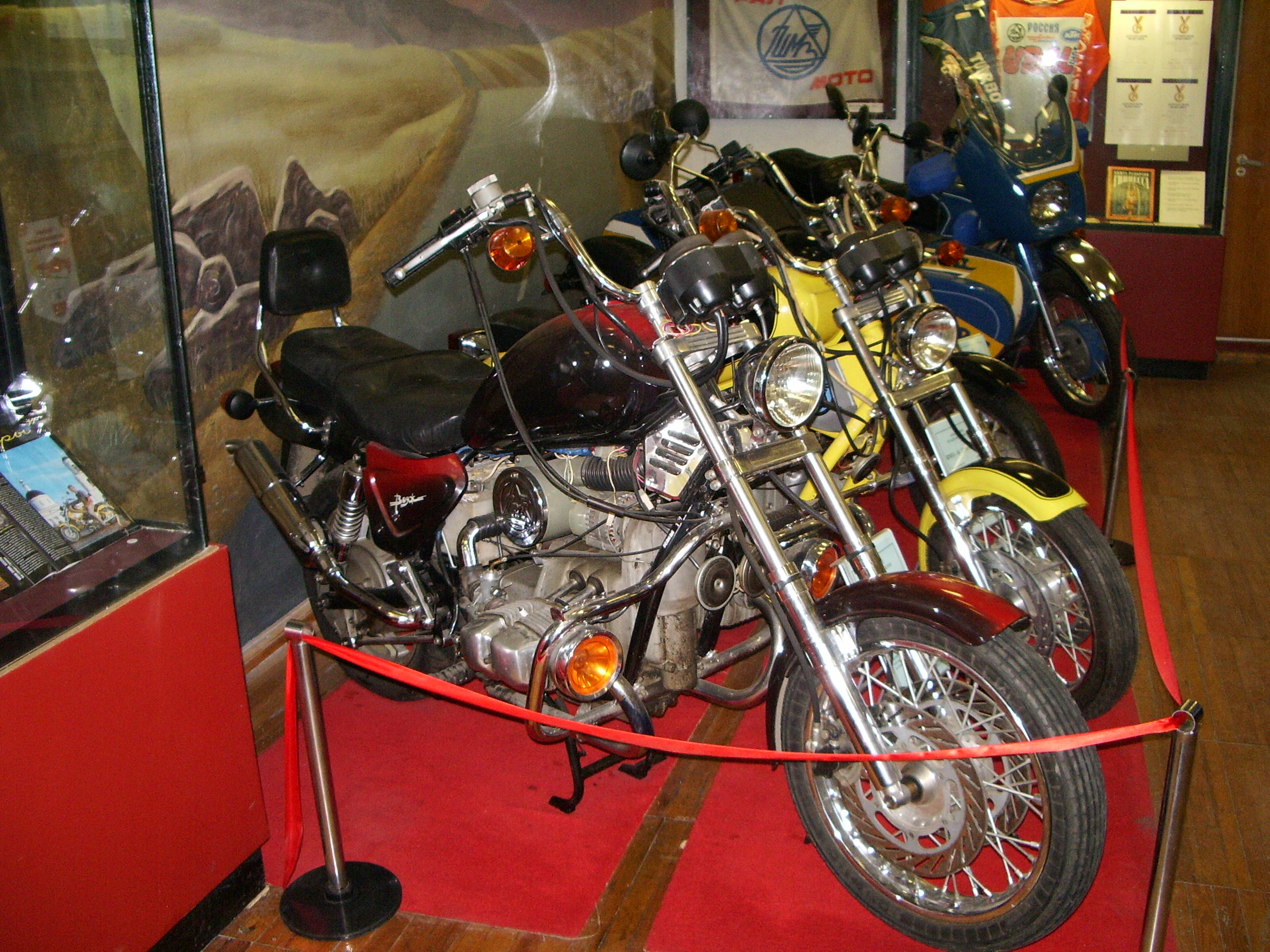 Модели выпускавшиеся заводом серийно